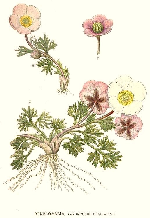 Original Description Renblomma, Ranunculus glacialis L.